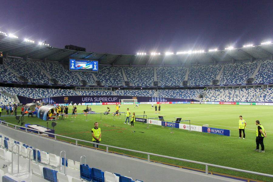 Напередодні матчу за Суперкубок УЄФА у Тбілісі, Грузія.